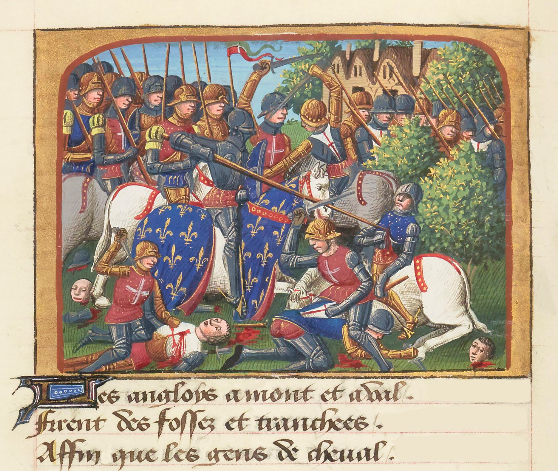 La bataille de Formigny, par Martial d'Auvergne, enluminure issue de l'ouvrage Vigiles de Charles VII, Paris, France, XV°siècle.